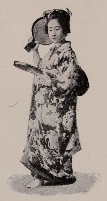 女の魂は合わせ鏡（キャプション）